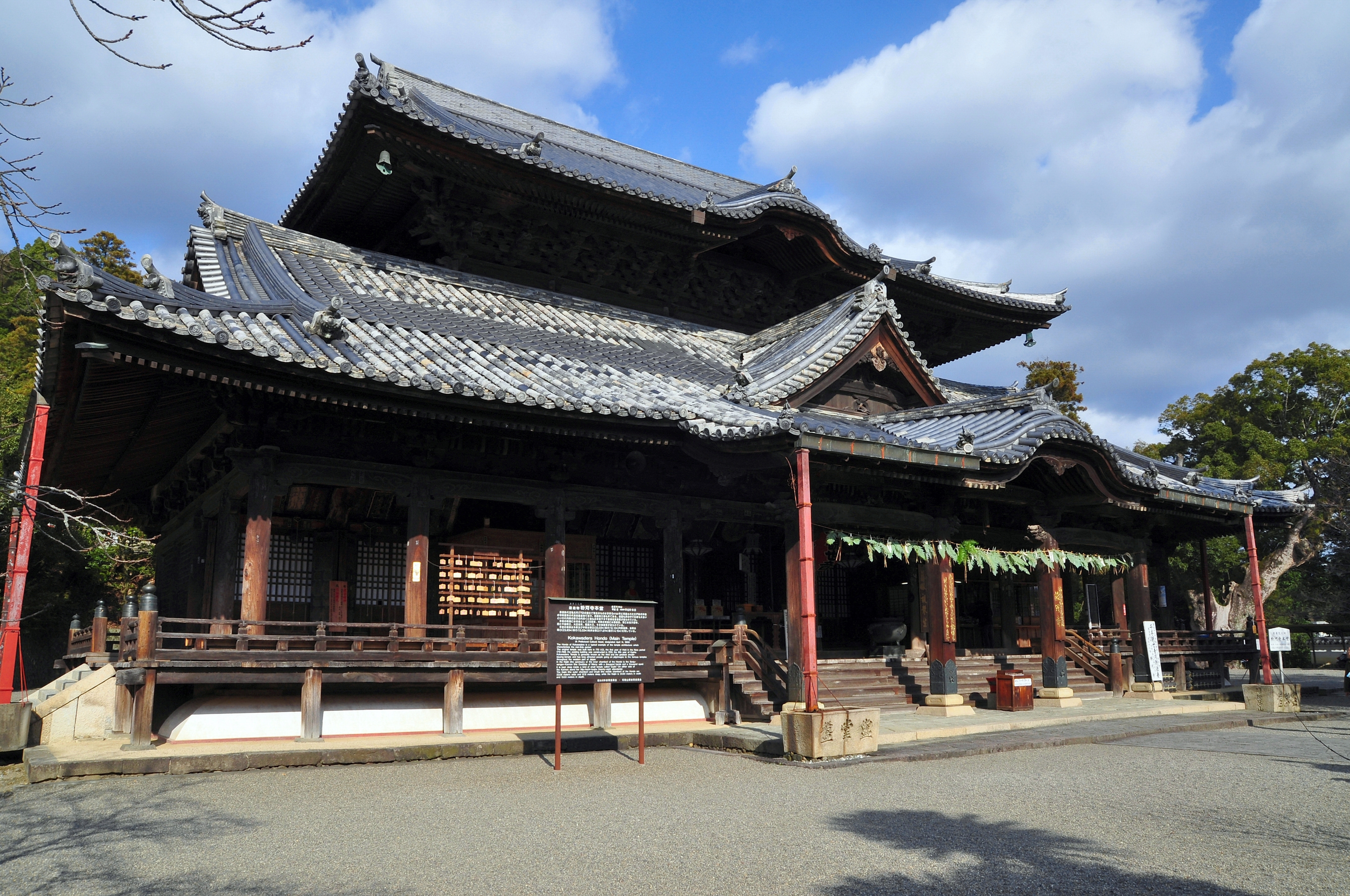 粉河寺